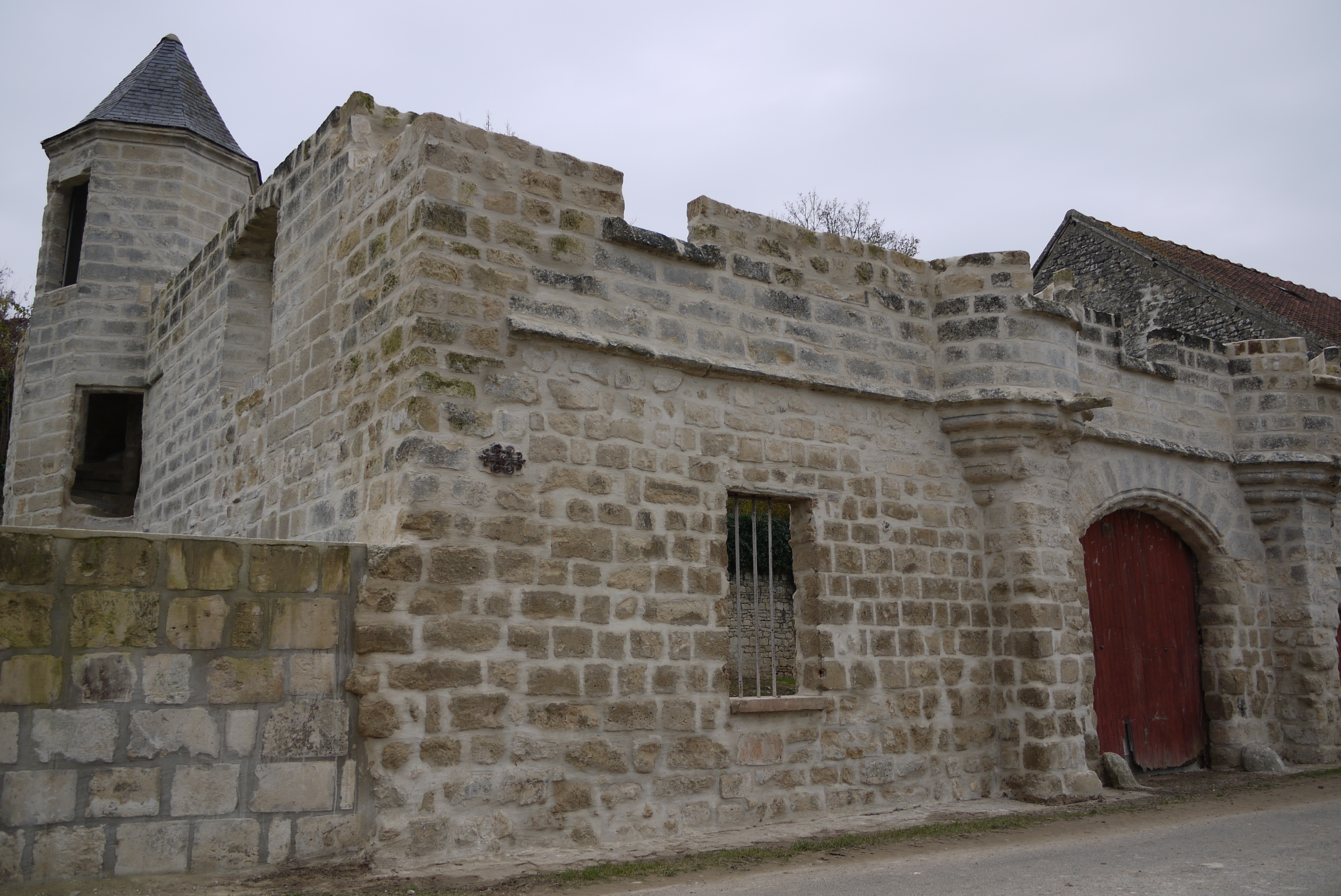 Prévôté de Lesges